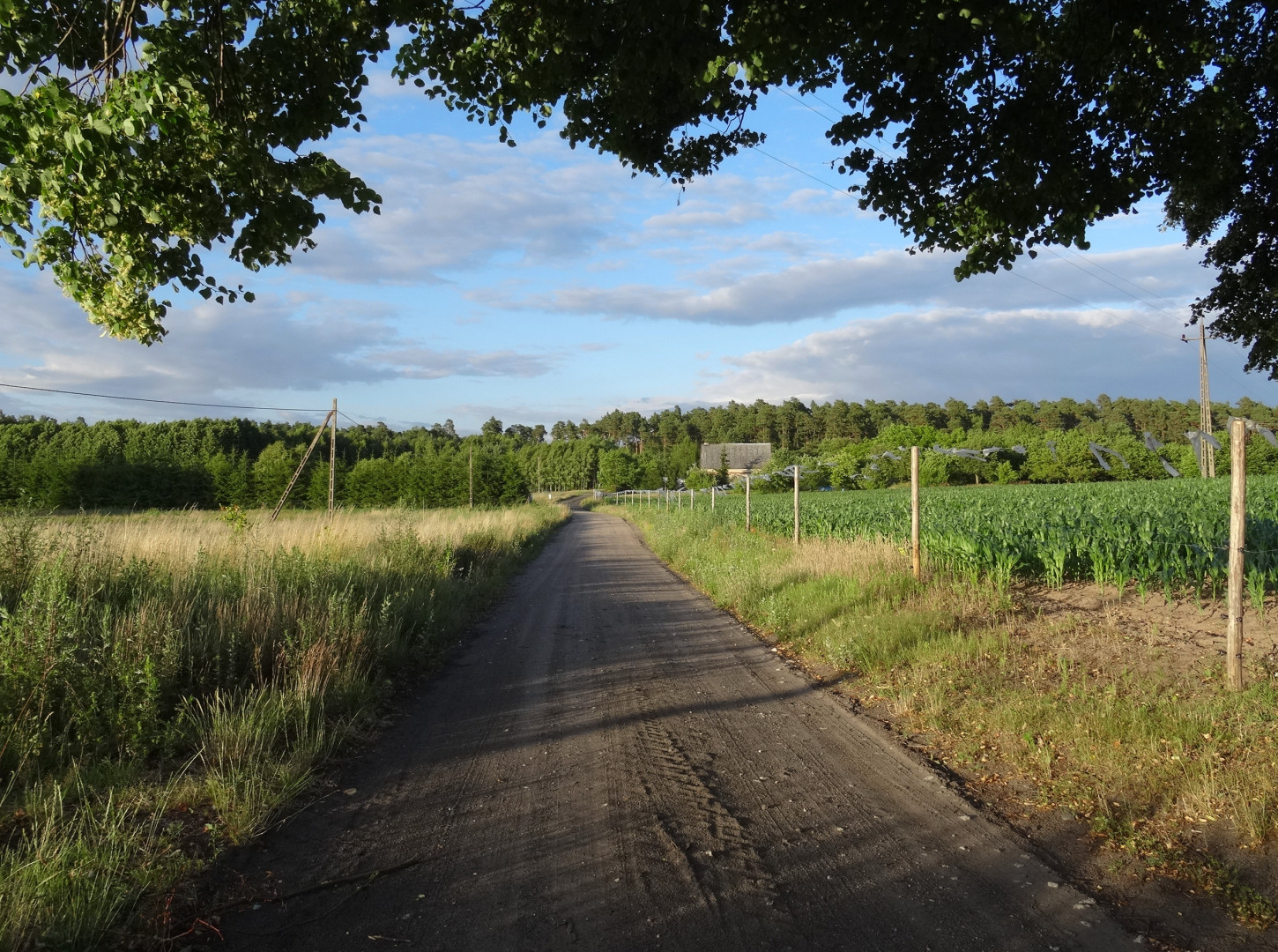 Położona w Puszczy Bydgoskiej wieś Leszyce, gmina Nowa Wieś Wielka, powiat bydgoski